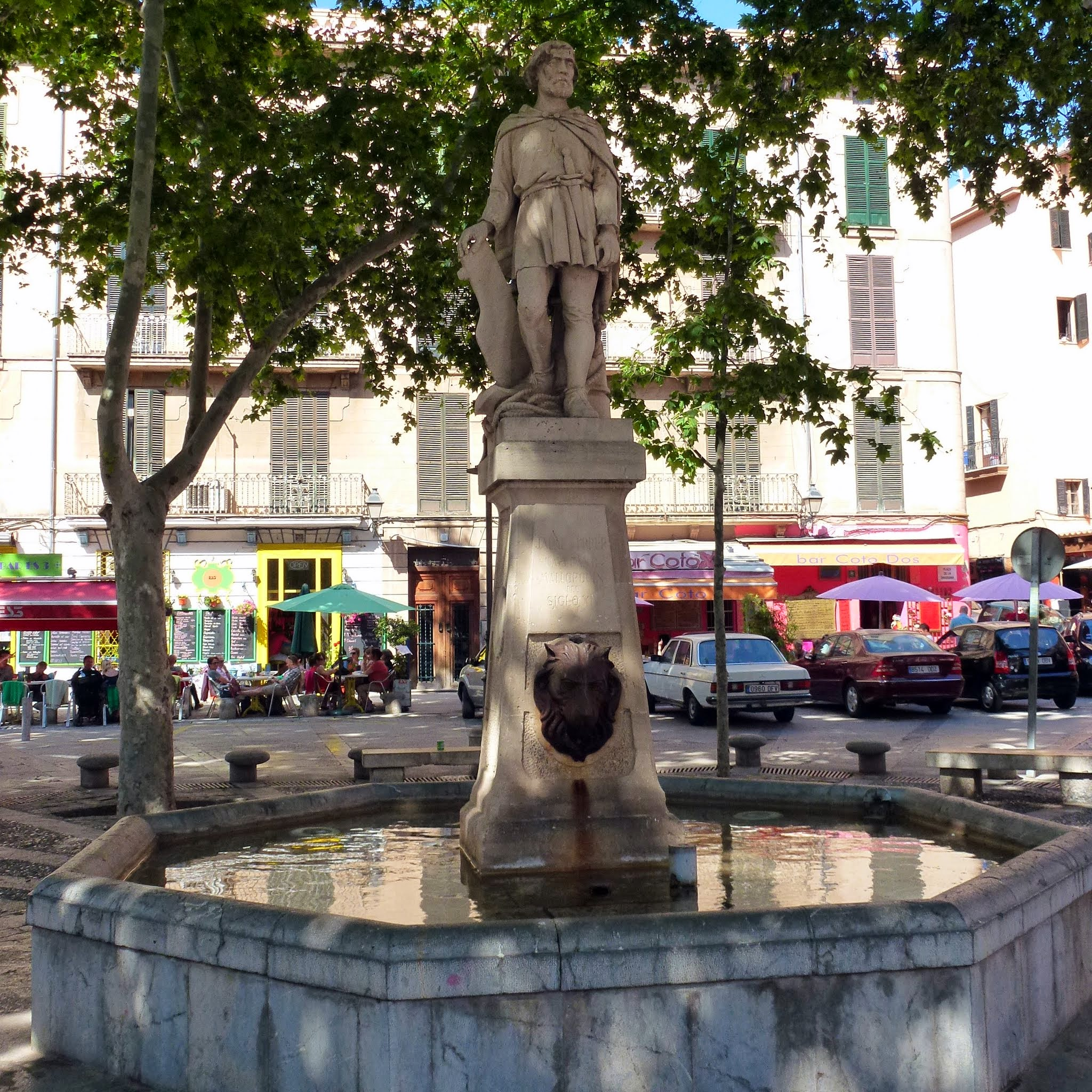 Jaume Ferrer, Palma de Mallorca